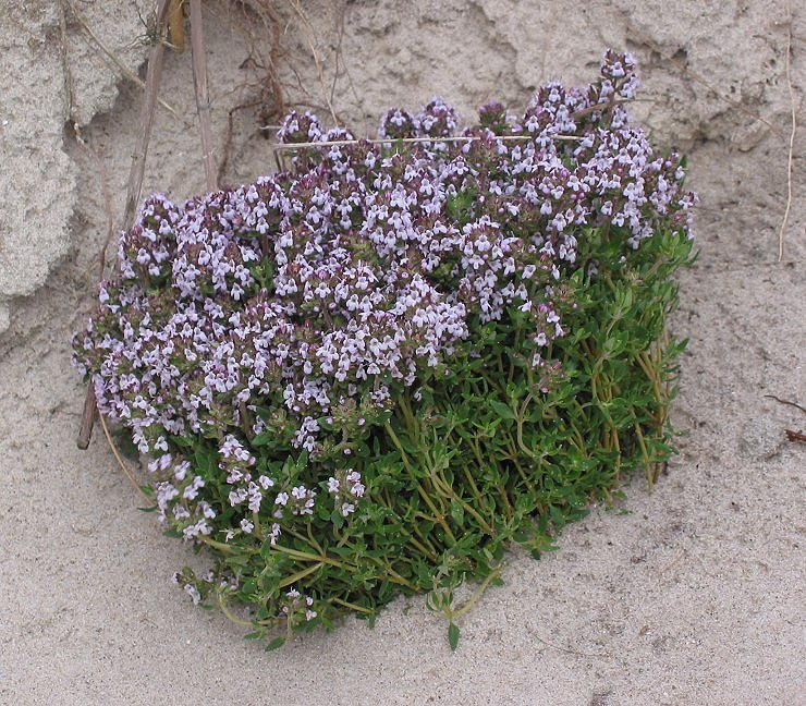 zelfgemaakte foto van Steentijm in duinenrand op Texel; eind mei